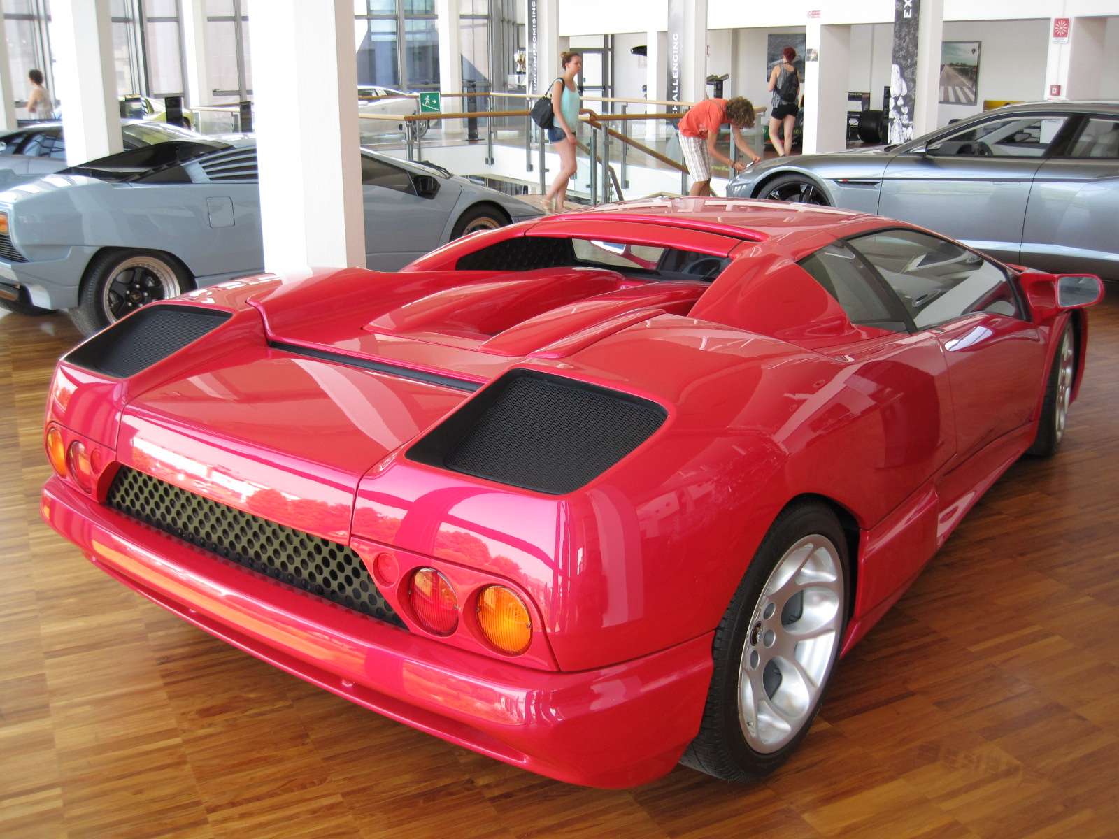 Musée Lamborghini - Prototype P147 Gandini / Acosta - 1997